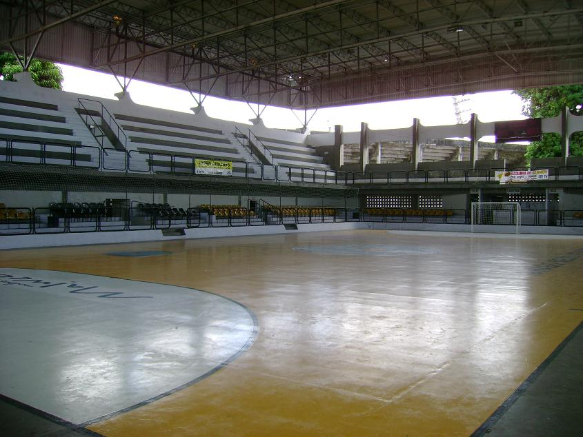 Ginásio Aécio de Borba, em Fortaleza, Ceará, Brasil.